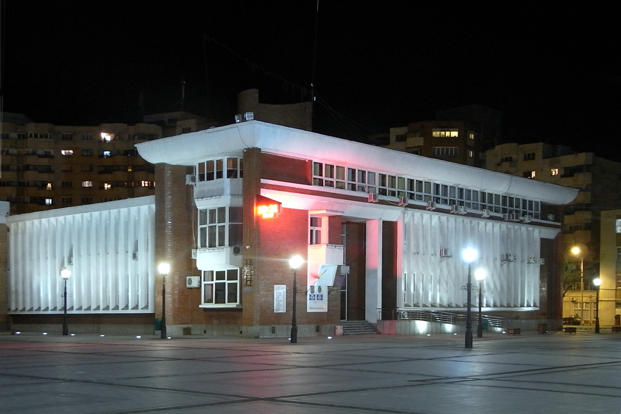 Das Rathaus von Reschitz (piața 1 decembrie 1918 nr. 1A) bei Nacht.